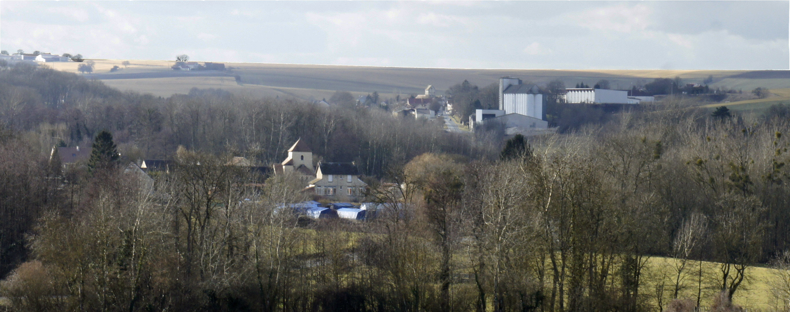 Chambrecy, Ville en Tardenois et Romigny vue prise depuis la Croix Ferlain".